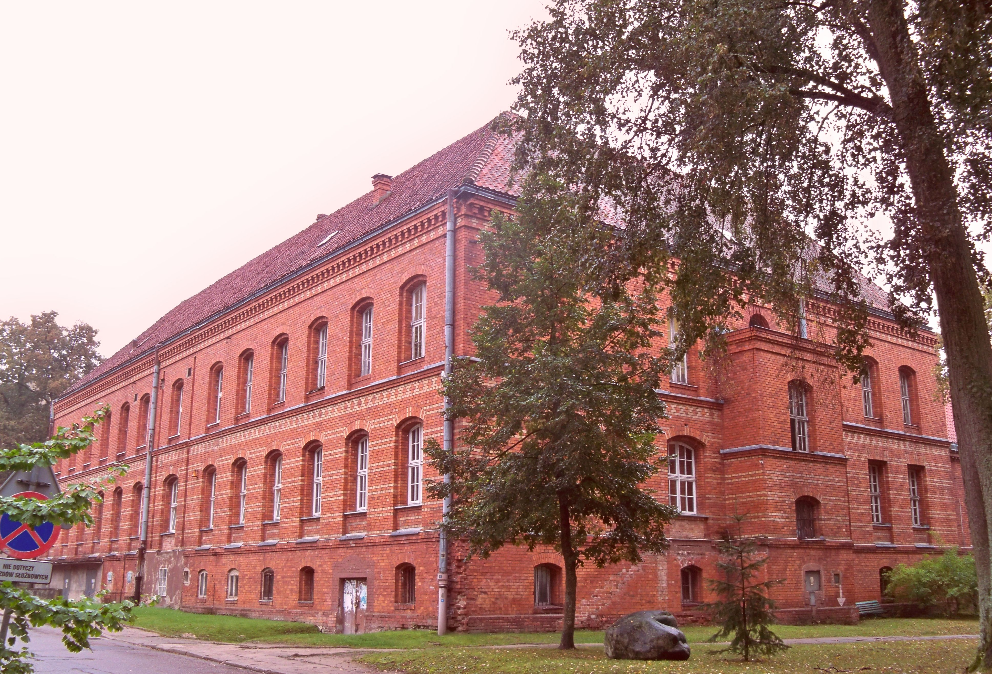 Dawny szpital psychiatryczny w Olsztynie-Kortowie. Obecnie Uniwersytet Warmińsko-Mazurski. Plac Łódzki 2. Katedra Melioracji i Kształtowania Środowiska, Katedra Leśnictwa i Ekologii Lasu i in.